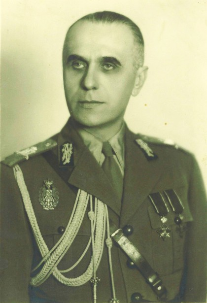 Generalul Dumitru Dămăceanu